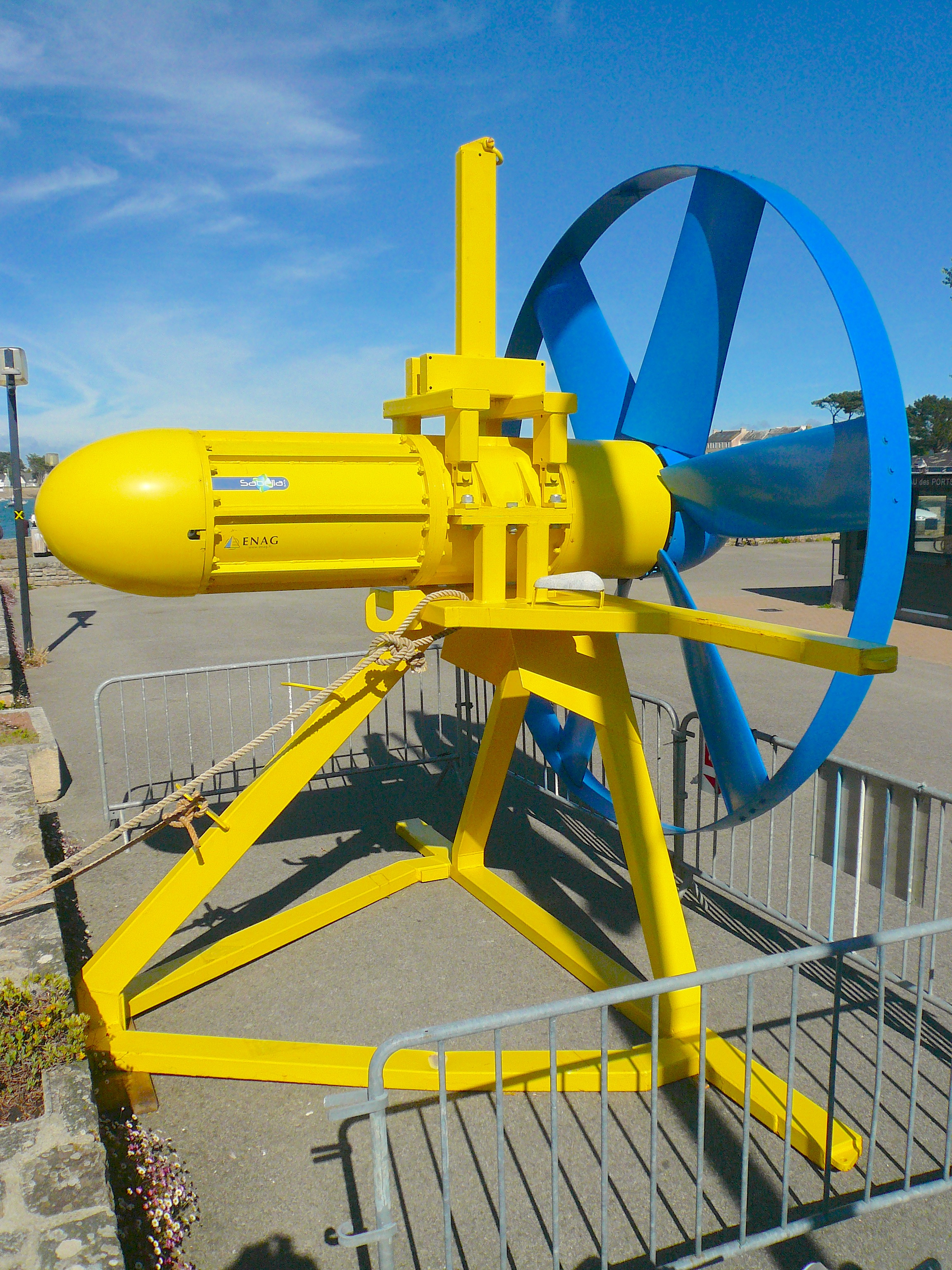 Hydrolienne D03, construite par l'entreprise Sabella, exposée à Port Navalo en mai 2017. D'un poids total de 2800 kg, elle peut délivrer une puissance de 30 kW. Première hydrolienne française, elle a été déployée en 2008 au large de Bénodet, dans l'estuaire de l'Odet, lors d'un projet soutenu par la région Bretagne et l'ADEME (Agence de l'Environnement et de la Maîtrise de l'Énergie). Durant les 12 mois de tests, l'entreprise Sabella a acquis des compétences et des connaissances sur la technologie des hydroliennes et sur l'environnement marin, en particulier sur l'absence complète d'accidentologie quant à la faune et sur les faibles émergences acoustiques. Cette hydrolienne D03 a par ailleurs été exposée sur le parvis de l'hôtel de ville de Paris pour représenter la COP 21.